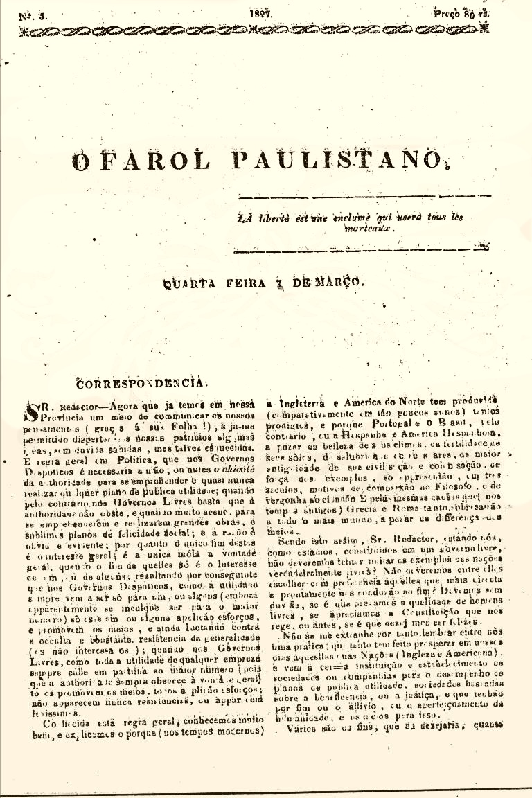 Frontispício do jornal brasileiro O Farol Paulistano, publicado duranto o Período Regencial por José da Costa Carvalho, Marquês de Monte Alegre.